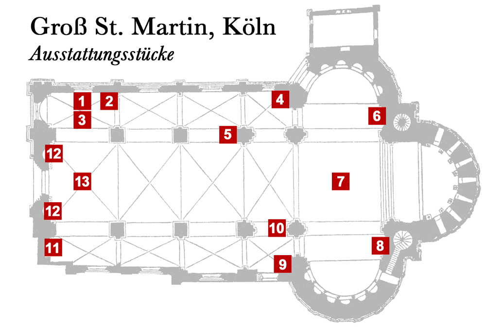 Grundriss Groß St. Martin Köln. Position einzelner Ausstattungsstücke